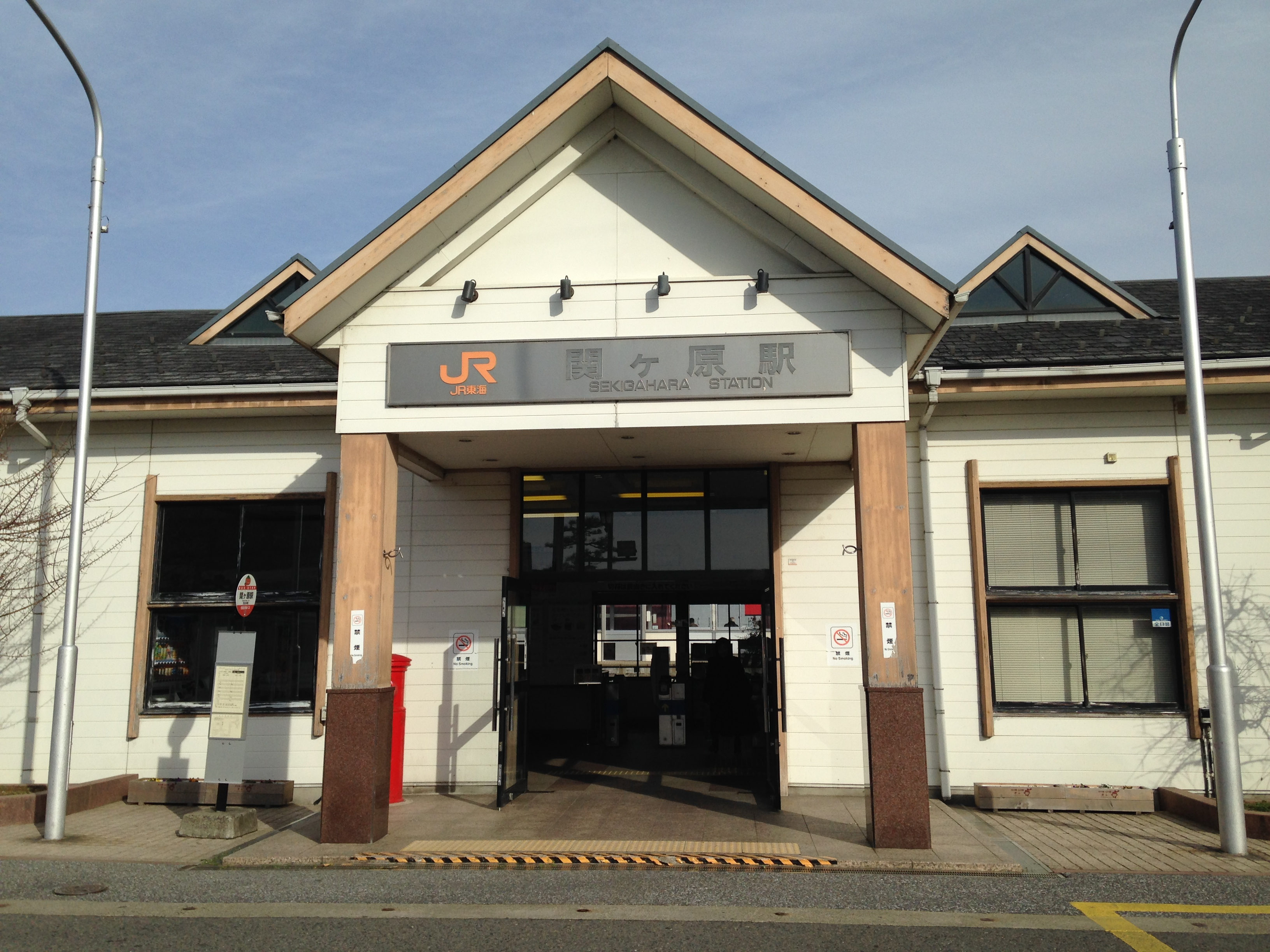 JR関ヶ原駅